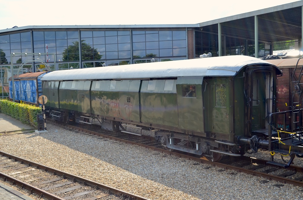 Nederlands Spoorwegmuseum rijtuig NS D 7521. Foto: Erik Swierstra.